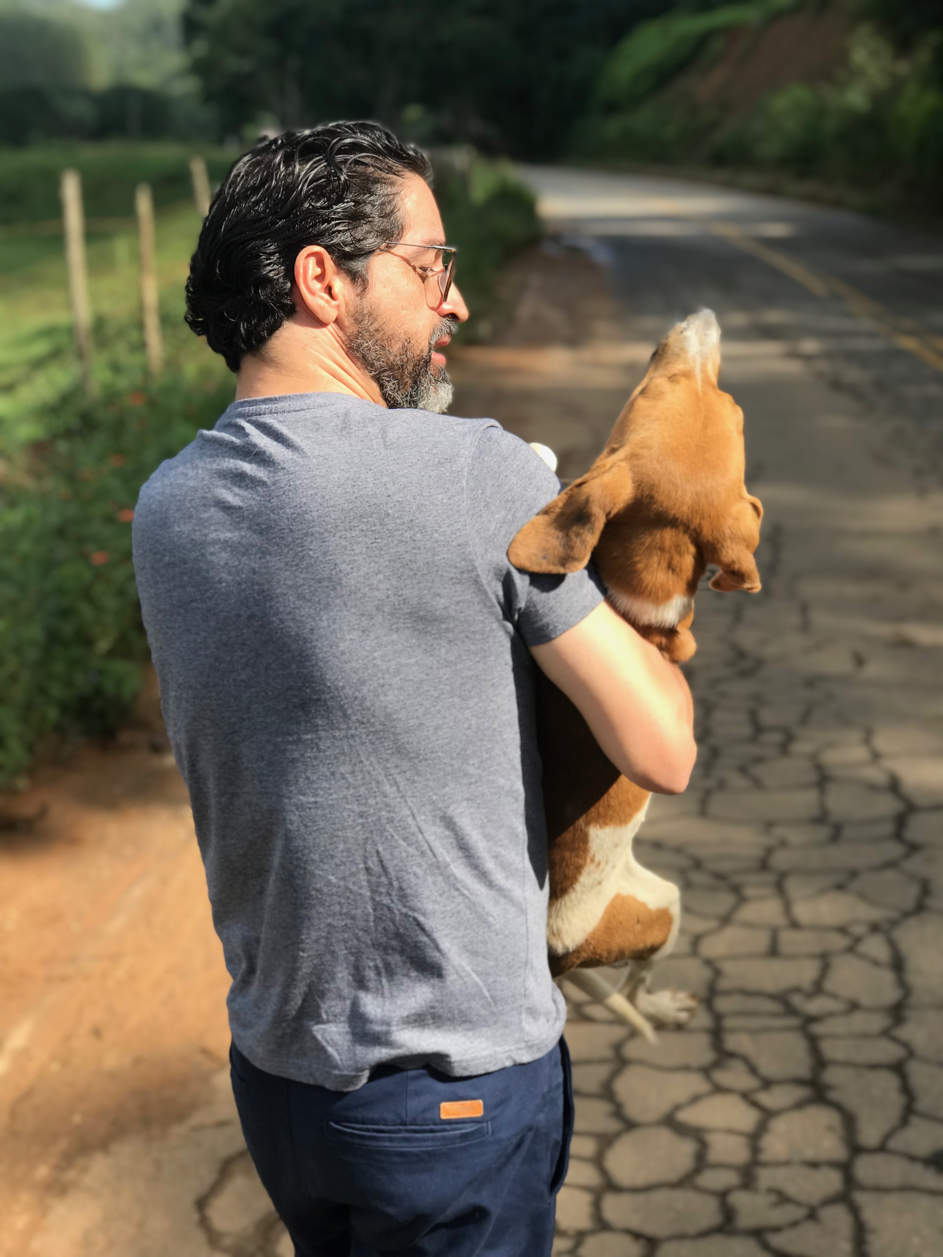 foto de arquivo pessoal, Osvaldo lopes, autor Paulo emmanuel